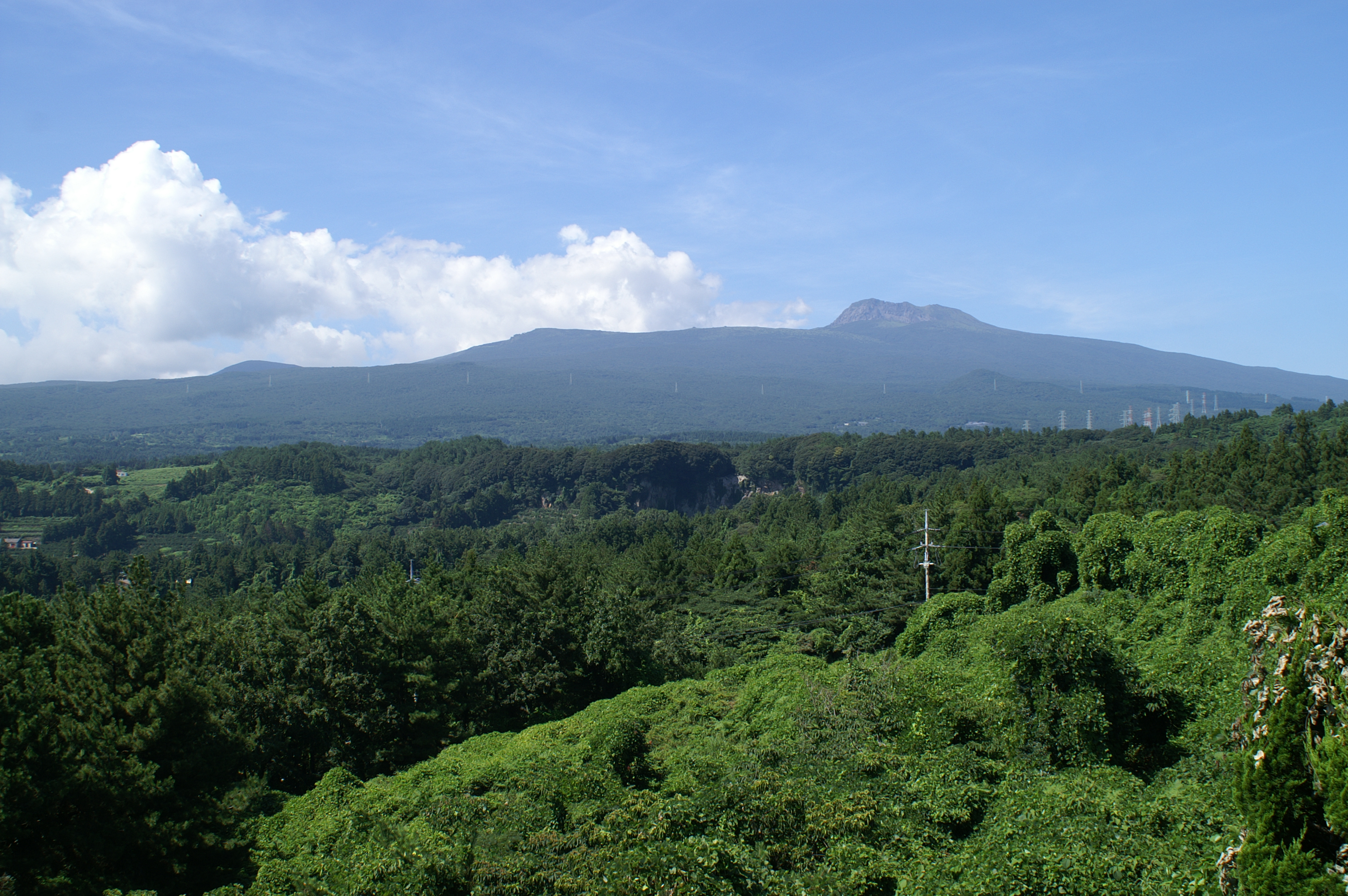 Халласан, природа